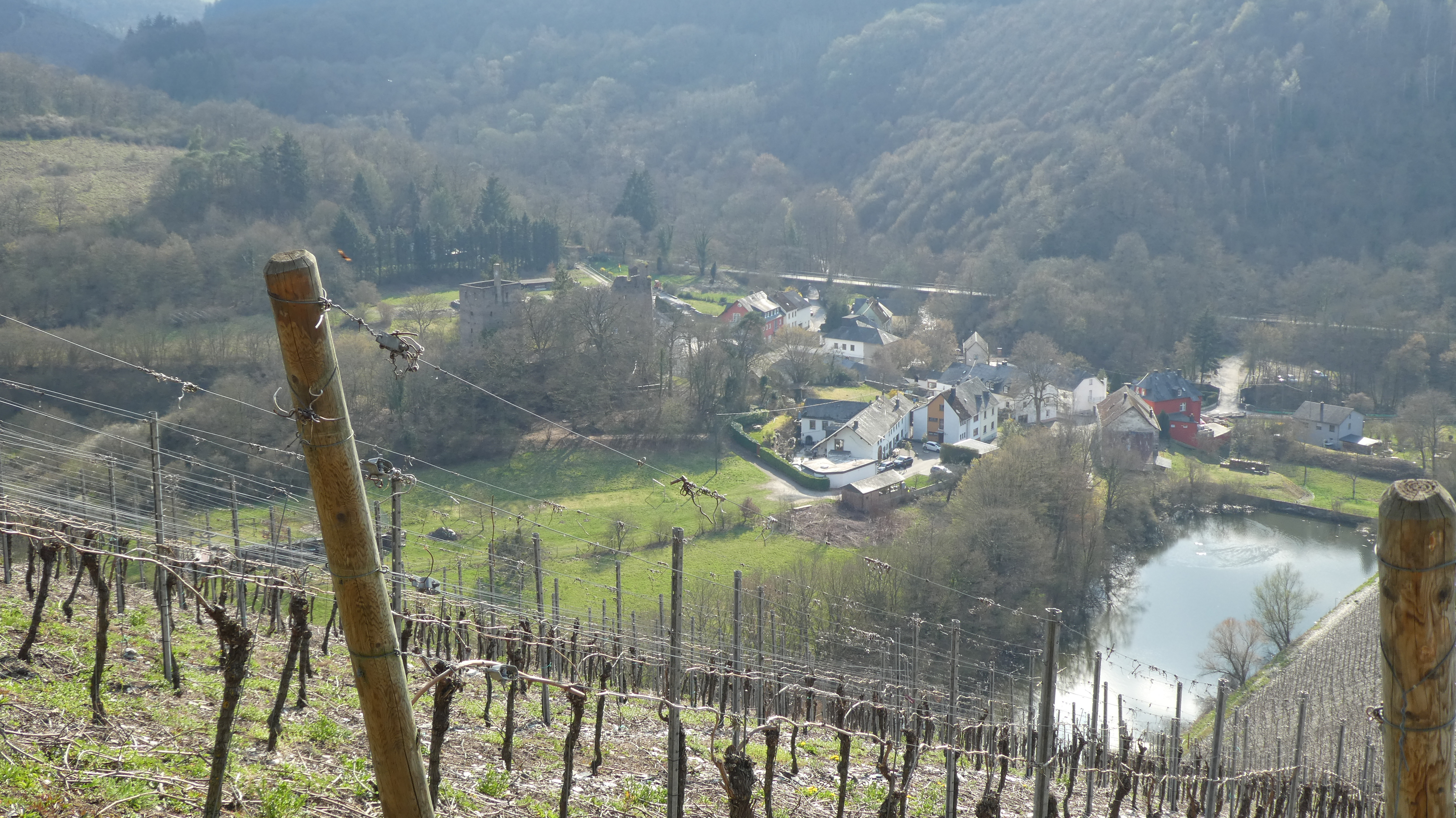 Blick auf die Ruine und den Ort vom Wingertsberg